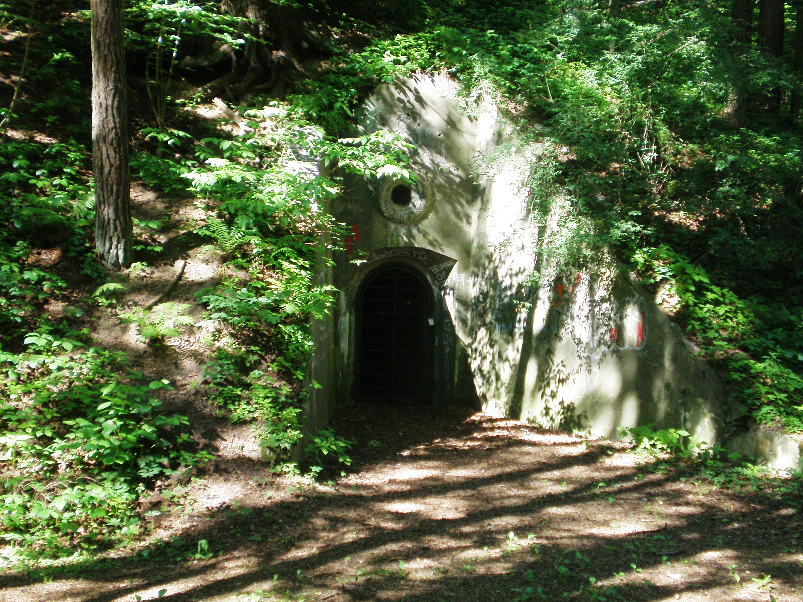 Antakalnio bunkeriai, Pavilnių RP, Vilnius